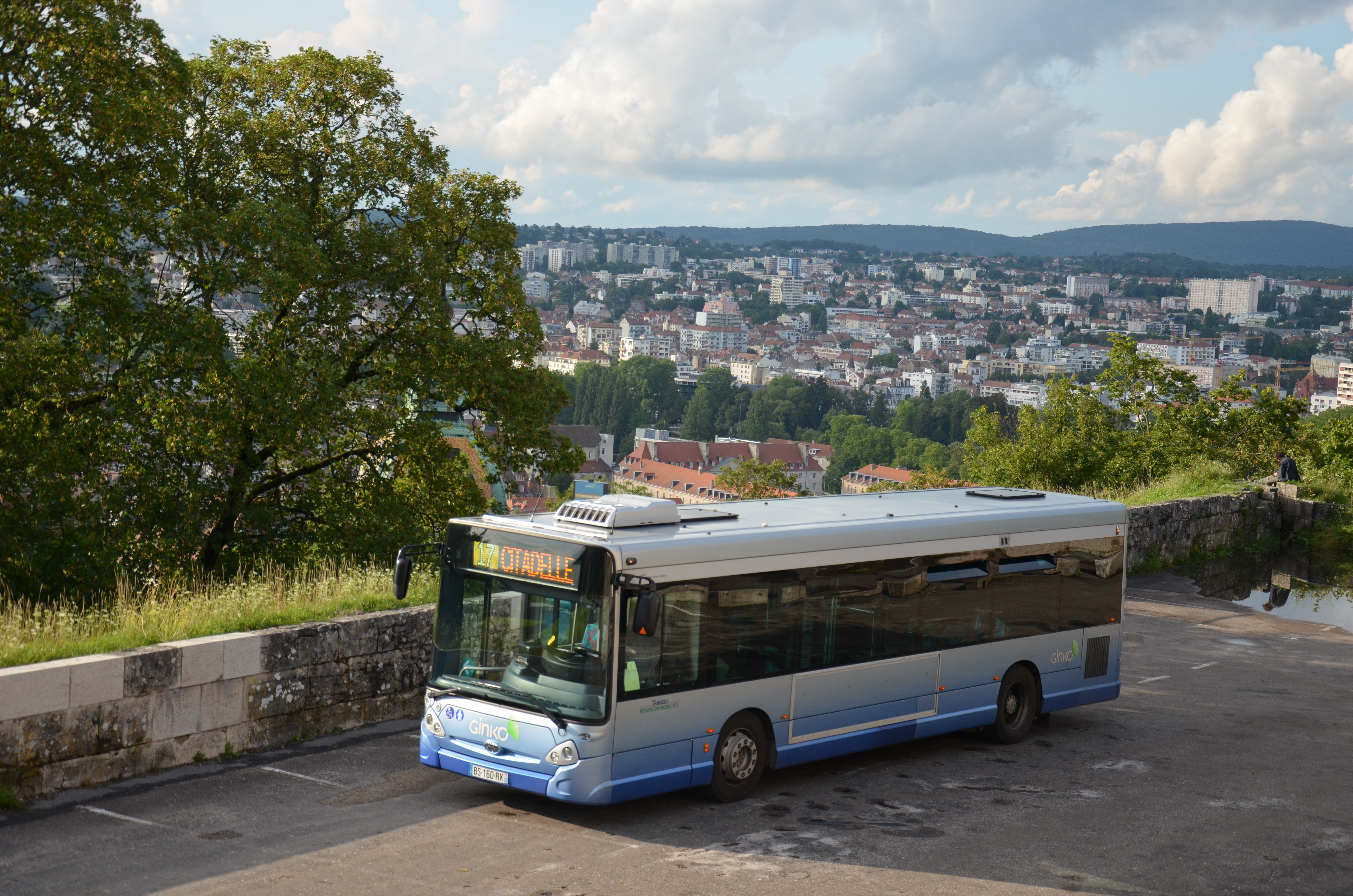 Heuliez GX 127L n°93 à la Citadelle, sur le réseau Ginko de Besançon.